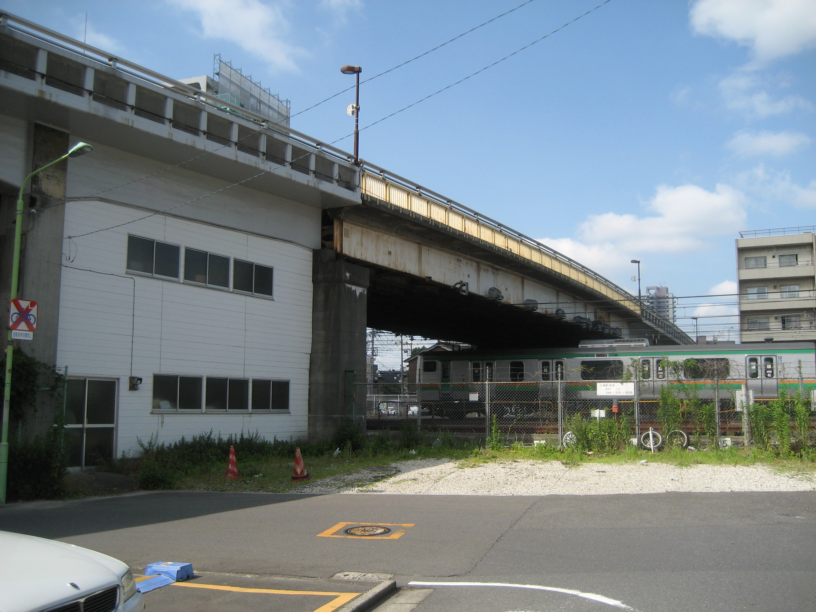 JR宇都宮線などに架かる川口陸橋